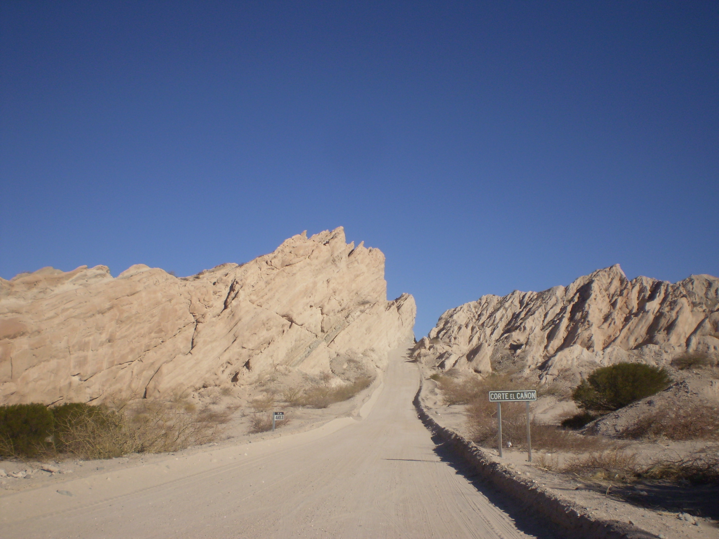 Angastaco (Salta), paisajes cercanos por la ruta 40 en los valles calchaquíes.